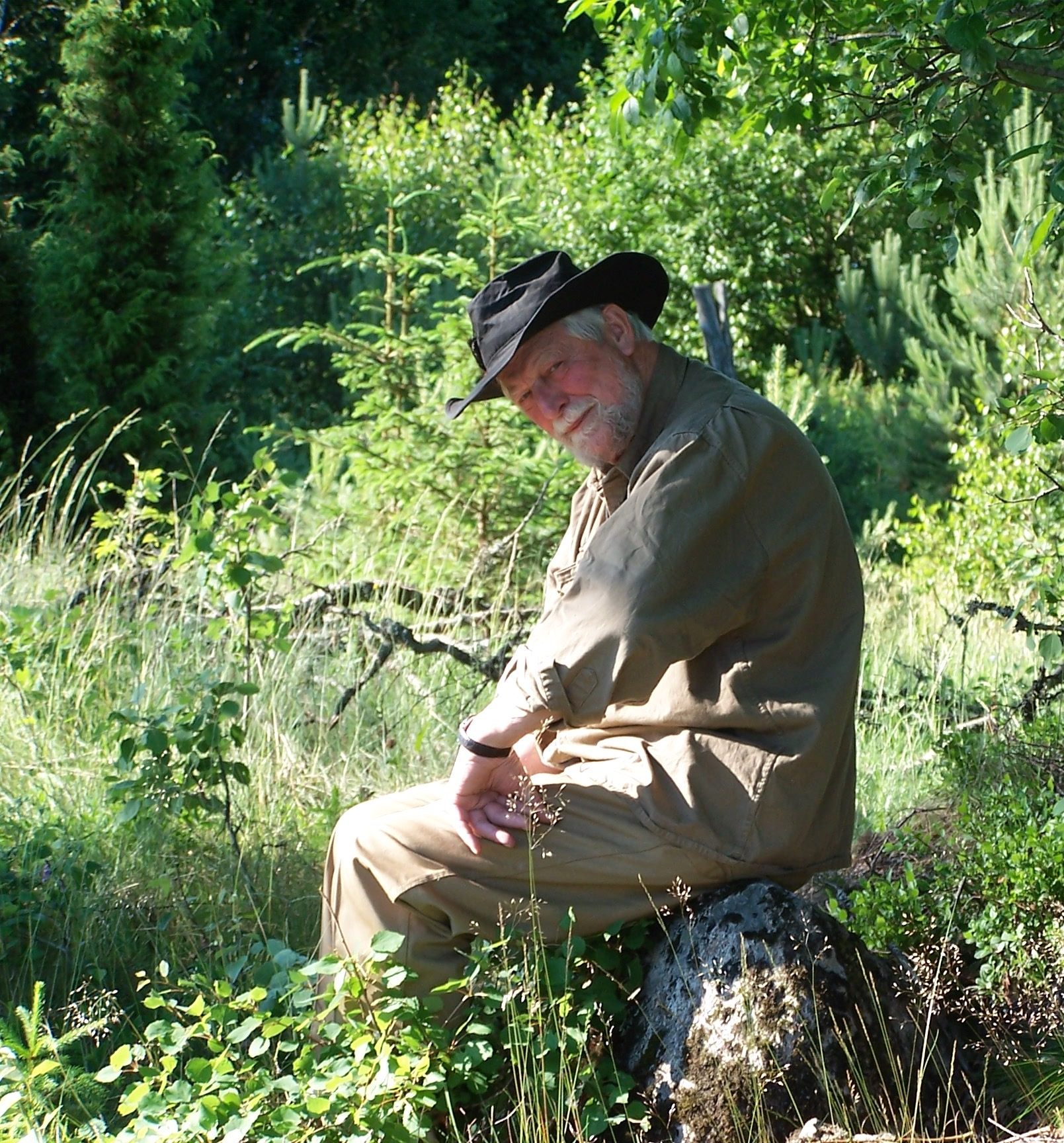 Georg i den Svenske vildmark.